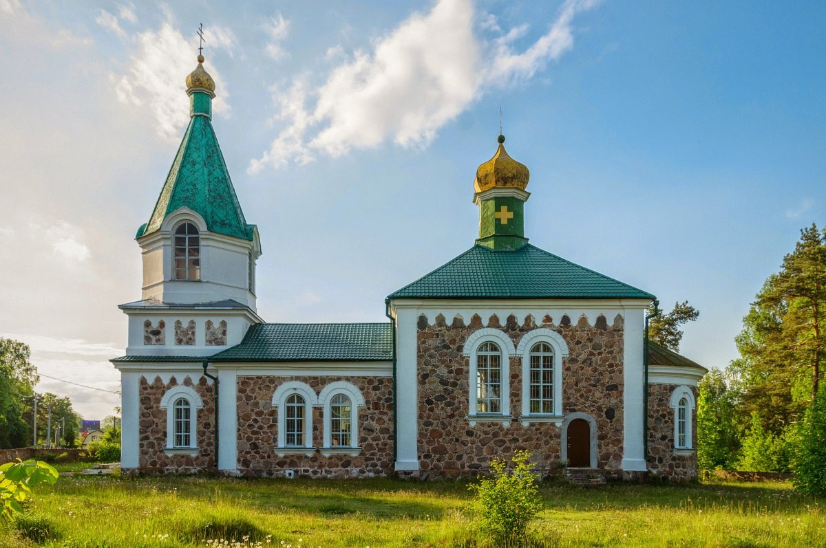 Касута. Царква Святых апосталаў Пятра і Паўла